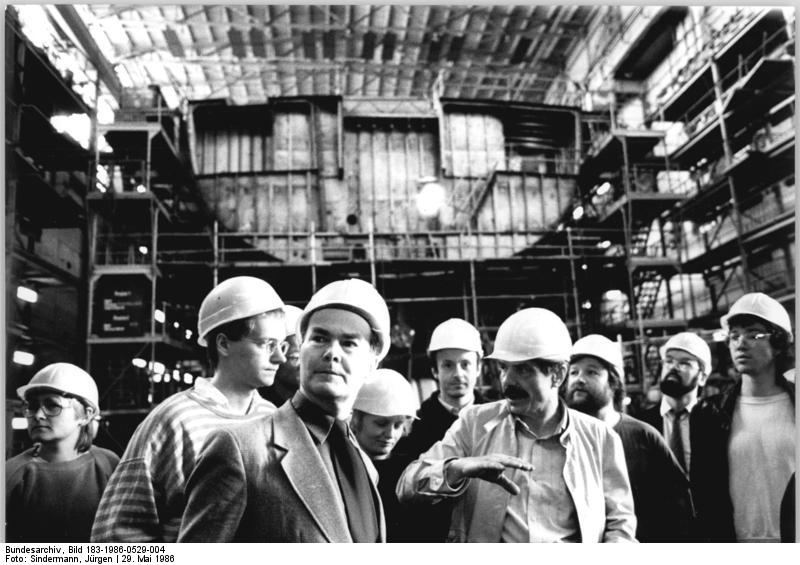 ADN-ZB/Sindermann-29.5.86-Rostock: Wahl Erneut für die Volkskammer kandidiert Prof.Dr.sc.theol. Gert Wendelborn (3.v.l.), Außerordentlicher Professor an der Sektion Theologie der Wilhelm-Pieck-Universität Rostock. Als Mandatsträger der CDU ist er seit 1981 Mitglied des Ausschusses für Auswärtige Angelegenheiten unserer obersten Volksvertretung. Seit 1966 ist Prof. Wendelborn aktives Mitglied des Friedensrates der DDR. Aus einer Werftarbeiterfamilie stammend, gilt sein besonderes Interesse dem DDR-Schiffbau. So begleitete er auch eine Gruppe junger Friedenskämpfer aus der BRD in die Volkswerft Stralsund.